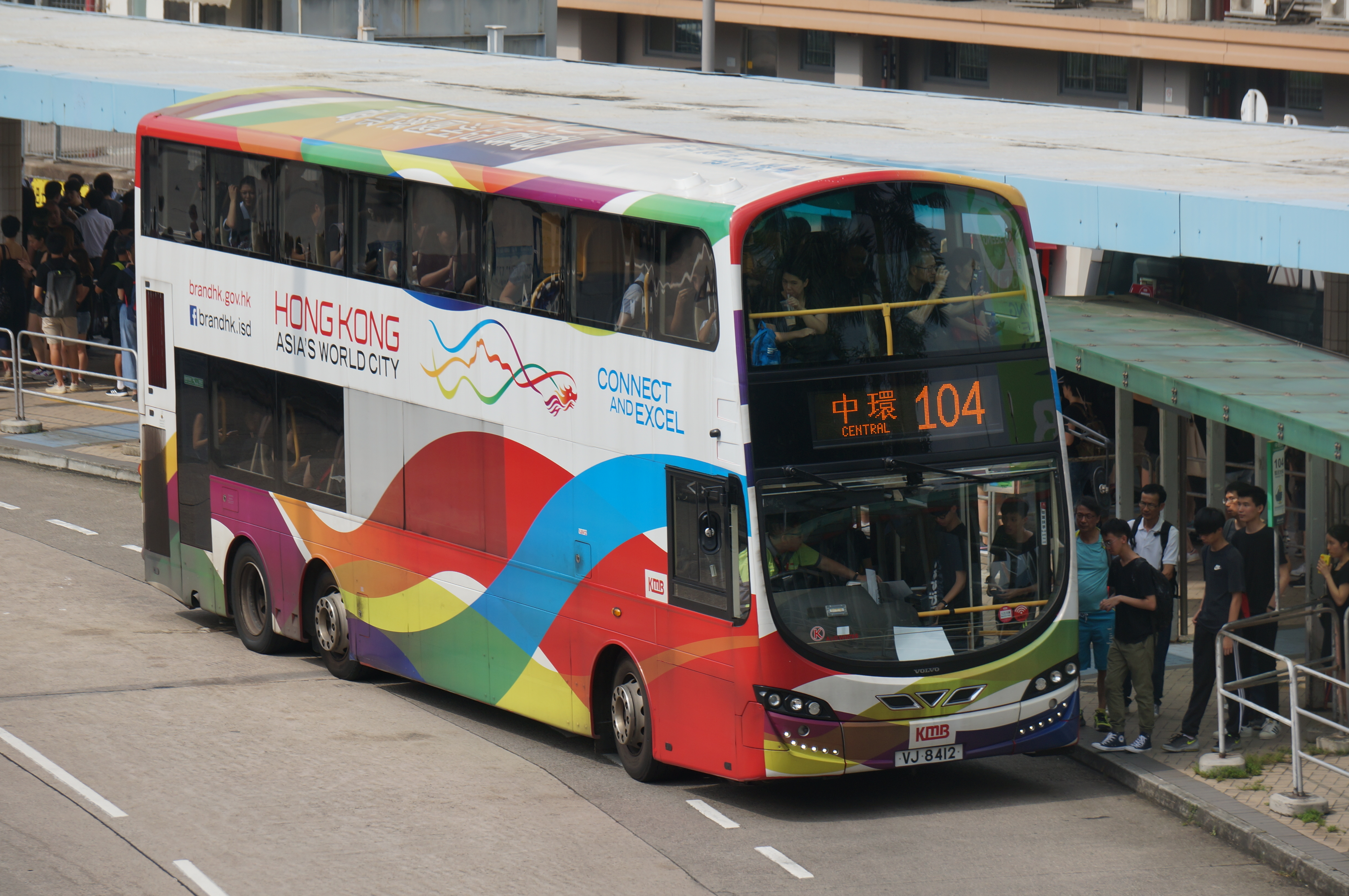 （VJ8412/AVBWU786）行駛過海隧道巴士104線